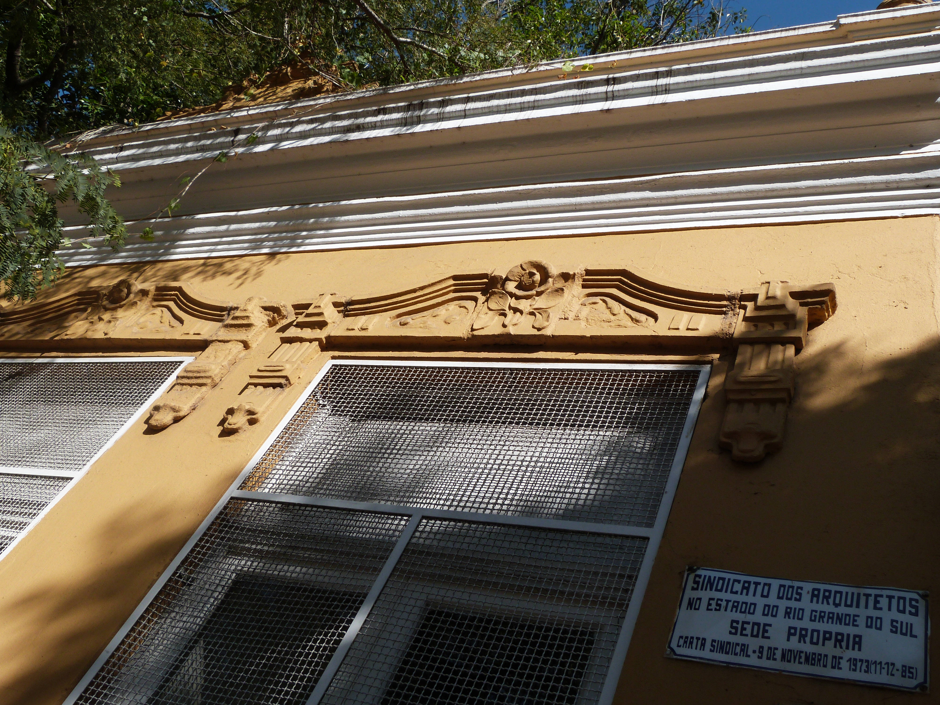 Sede do SAERGS na Rua José do Patrocínio, Porto Alegre - RS.